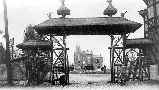 Photographie de la Villa Naimeu en 1903. Elle était située à Heusy (section de la ville belge de Verviers) et a été reconvertie en sanatorium en 1903 puis en clinique en 1908. Se trouve aujourd'hui à son emplacement la Clinique CHC Heusy.